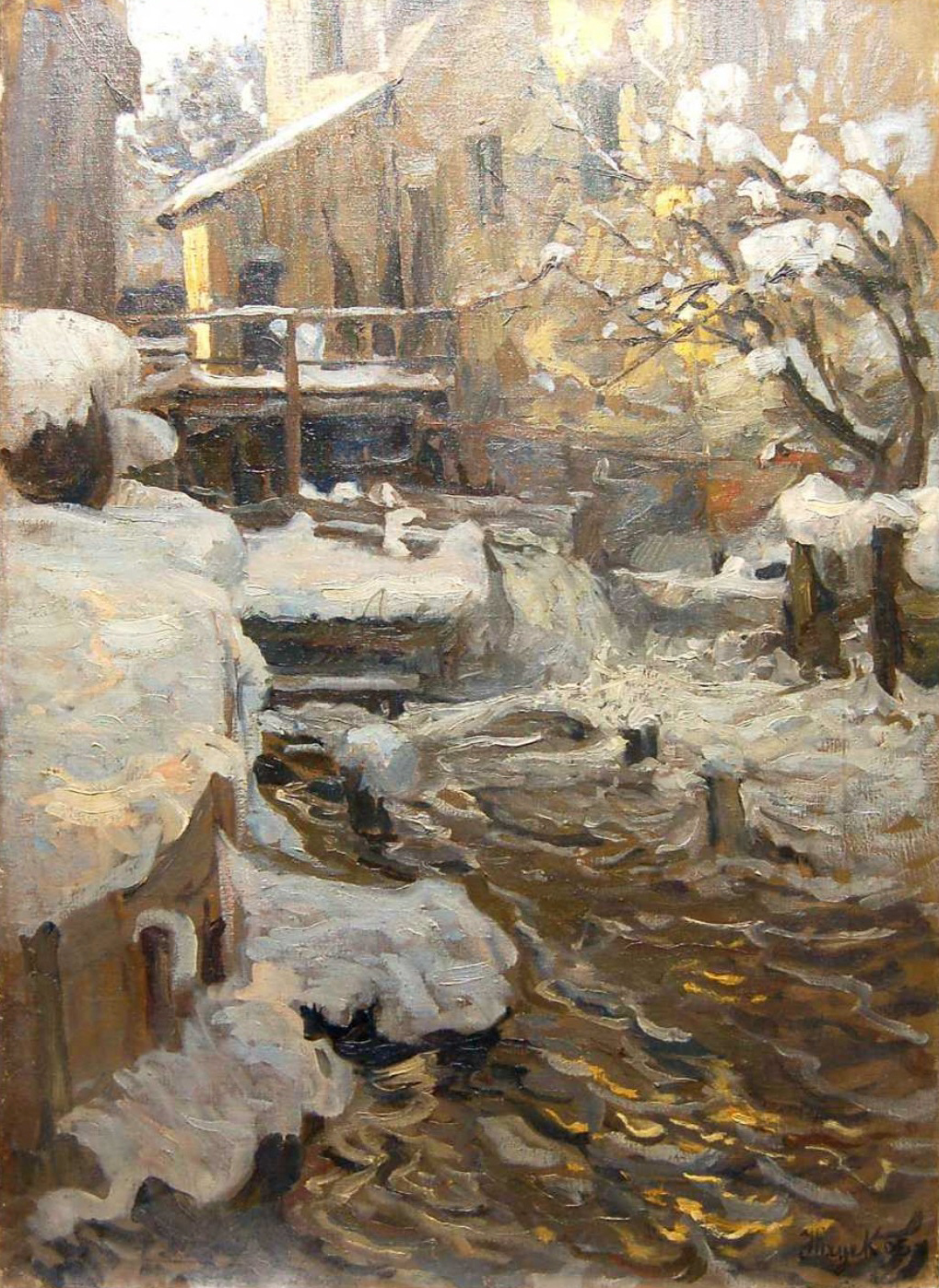 Verschneites Wehr in Dachau.